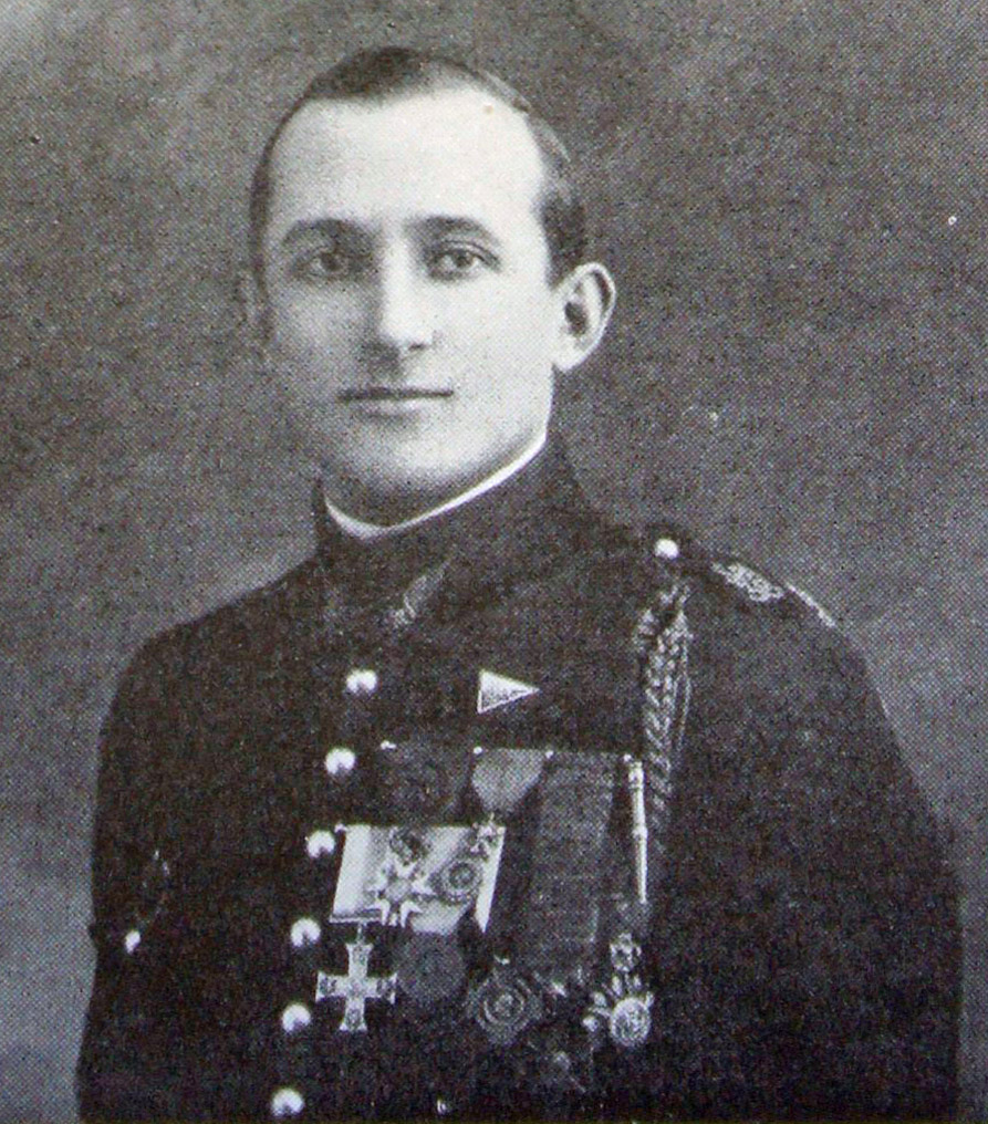 Madon dans le Miror un N° de l'illustration spécial aviatoin.